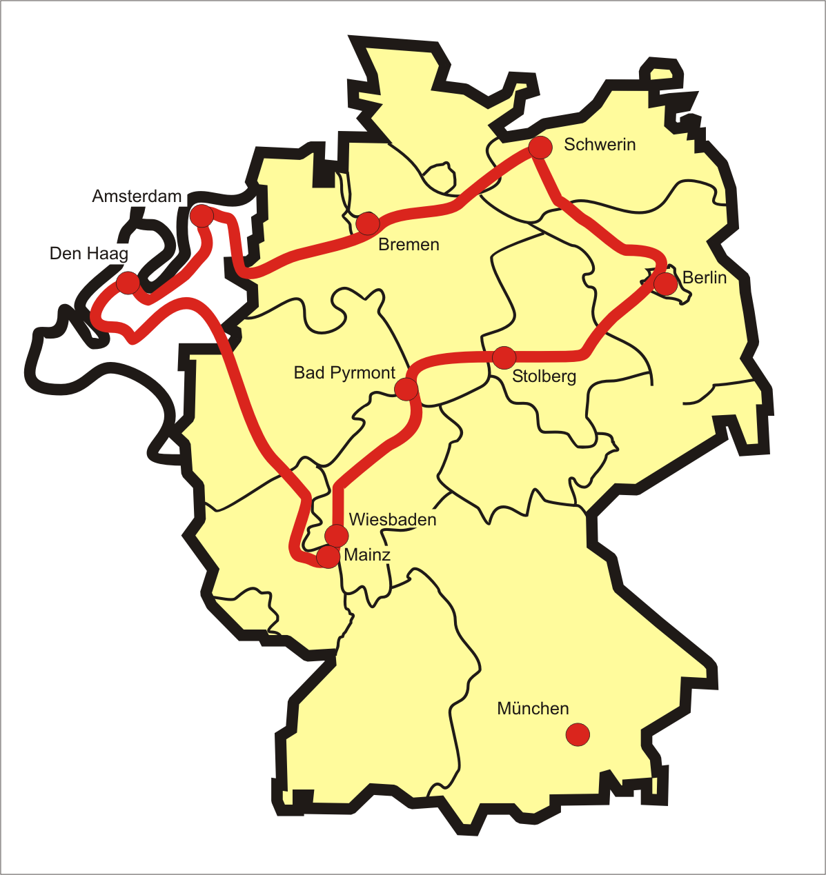 Ferienstraße: Oranier-Route Fotograf: presse03, selbst erstellt 2005 Lizenz: GNU-FDL